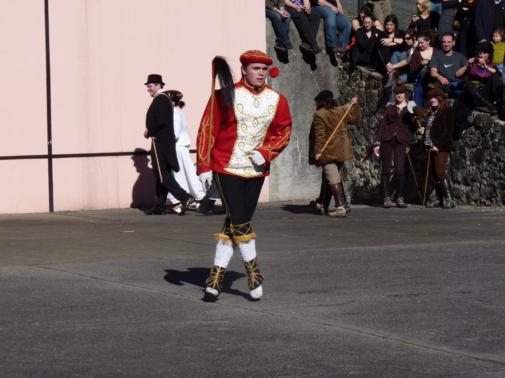 Santa Graziko Maskaradak. 2011-02-06. Txerreroa dantzan.